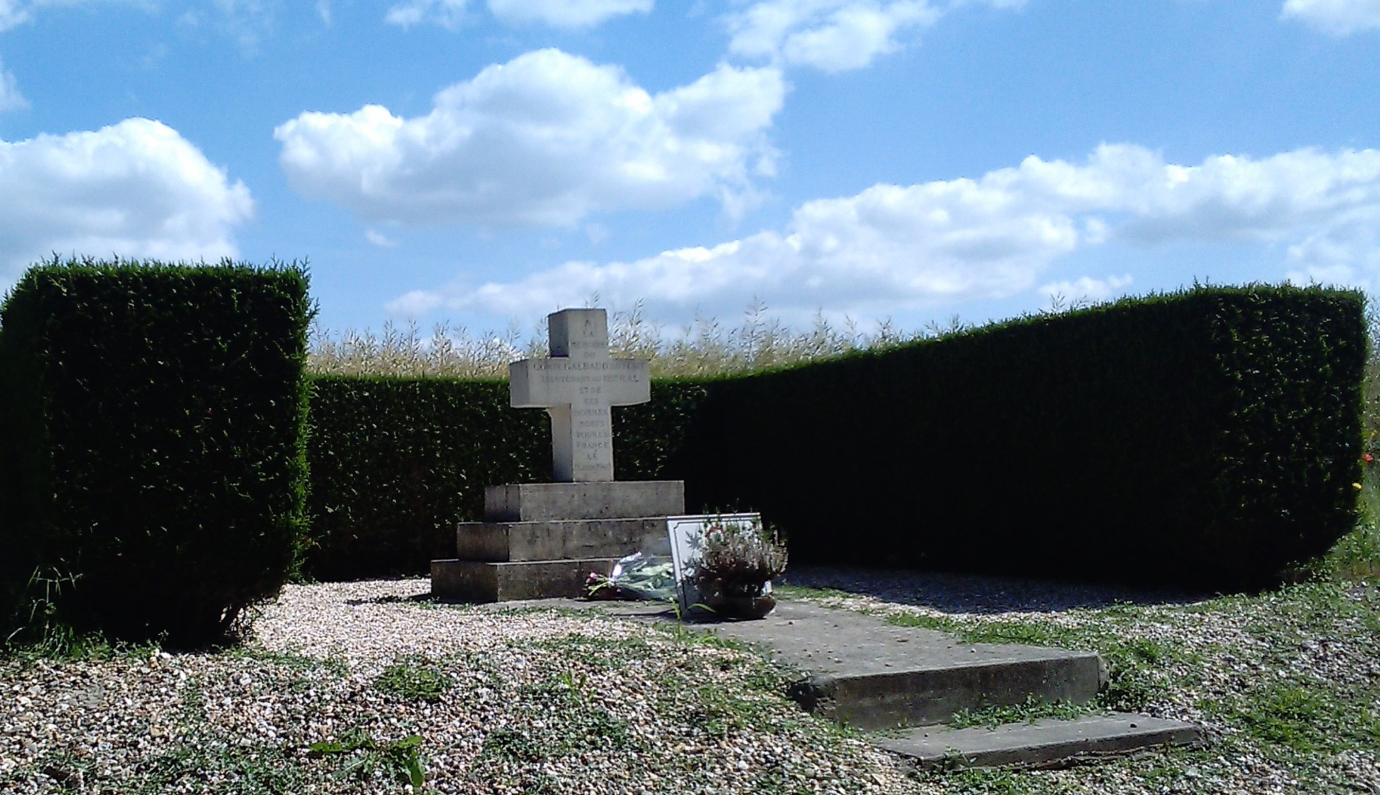 Mémorial du 9 juin 1940 à l'écart de Villers-sur-le-Roule.